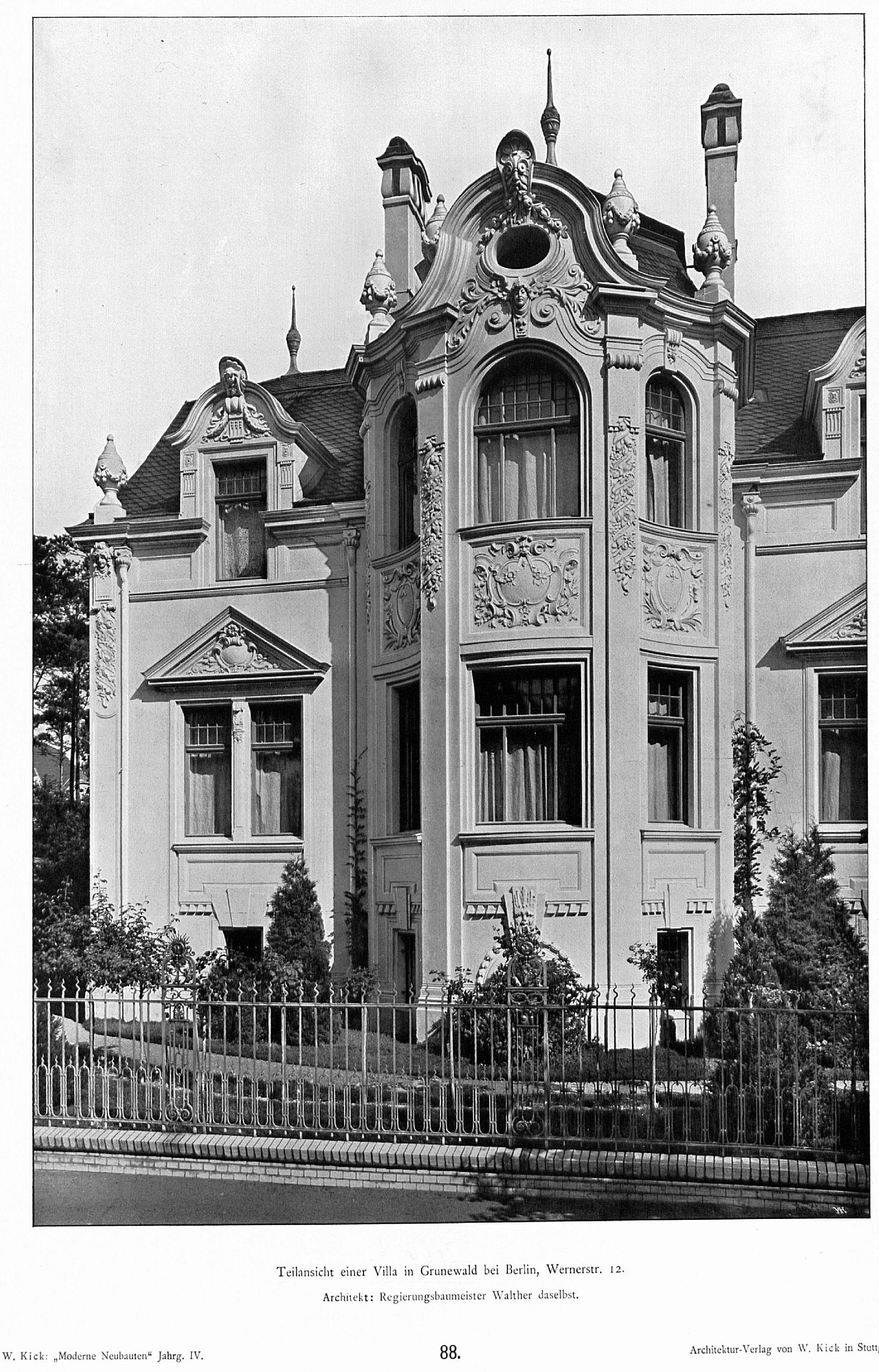 Villa Wernerstraße 10/12 in Berlin-Grunewald; erbaut 1896-1897 nach Entwurf des Berliner Architekten Wilhelm Walther; unter Denkmalschutz